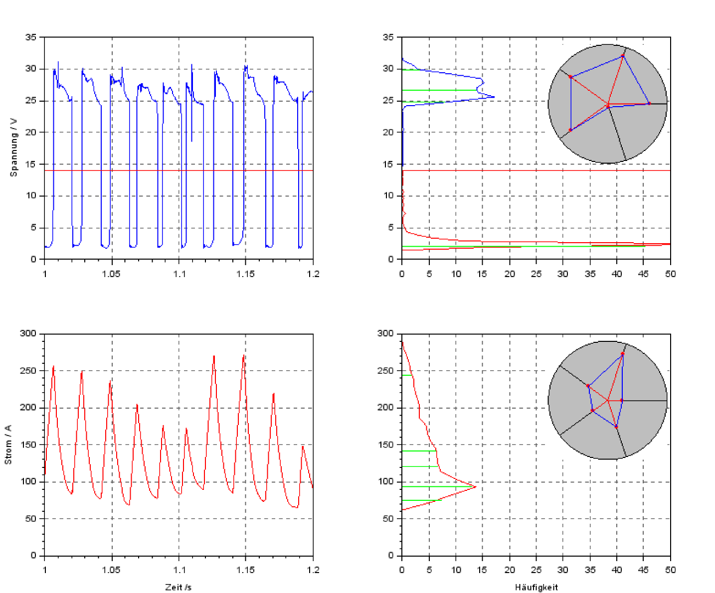 Bildung von Merkmalen aus den elektrischen Signalen beim MAG-Schweißen mit Kurzlichtbogen